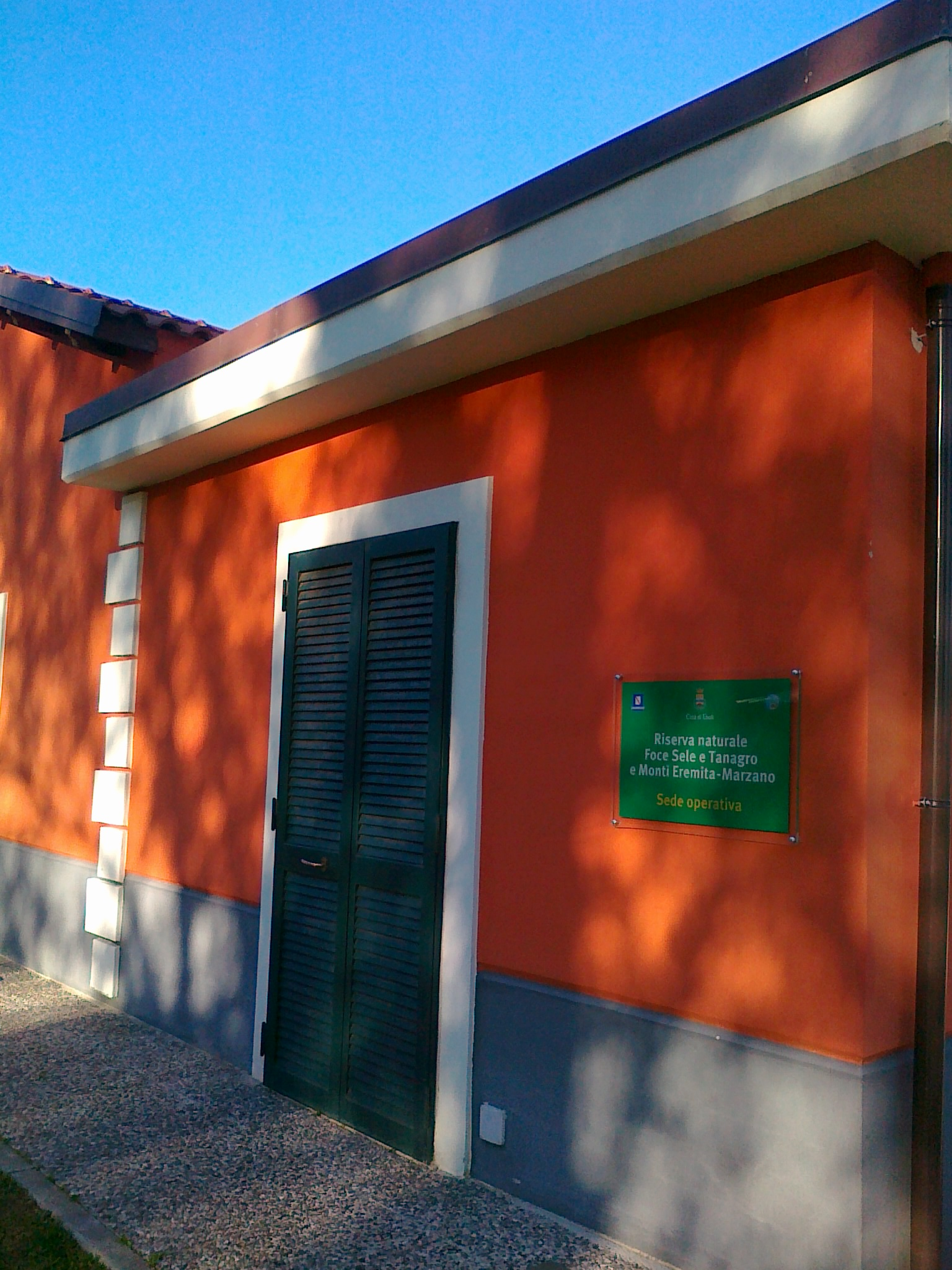 La sede operativa della Riserva naturale Foce Sele e Tanagro nel comune di Eboli